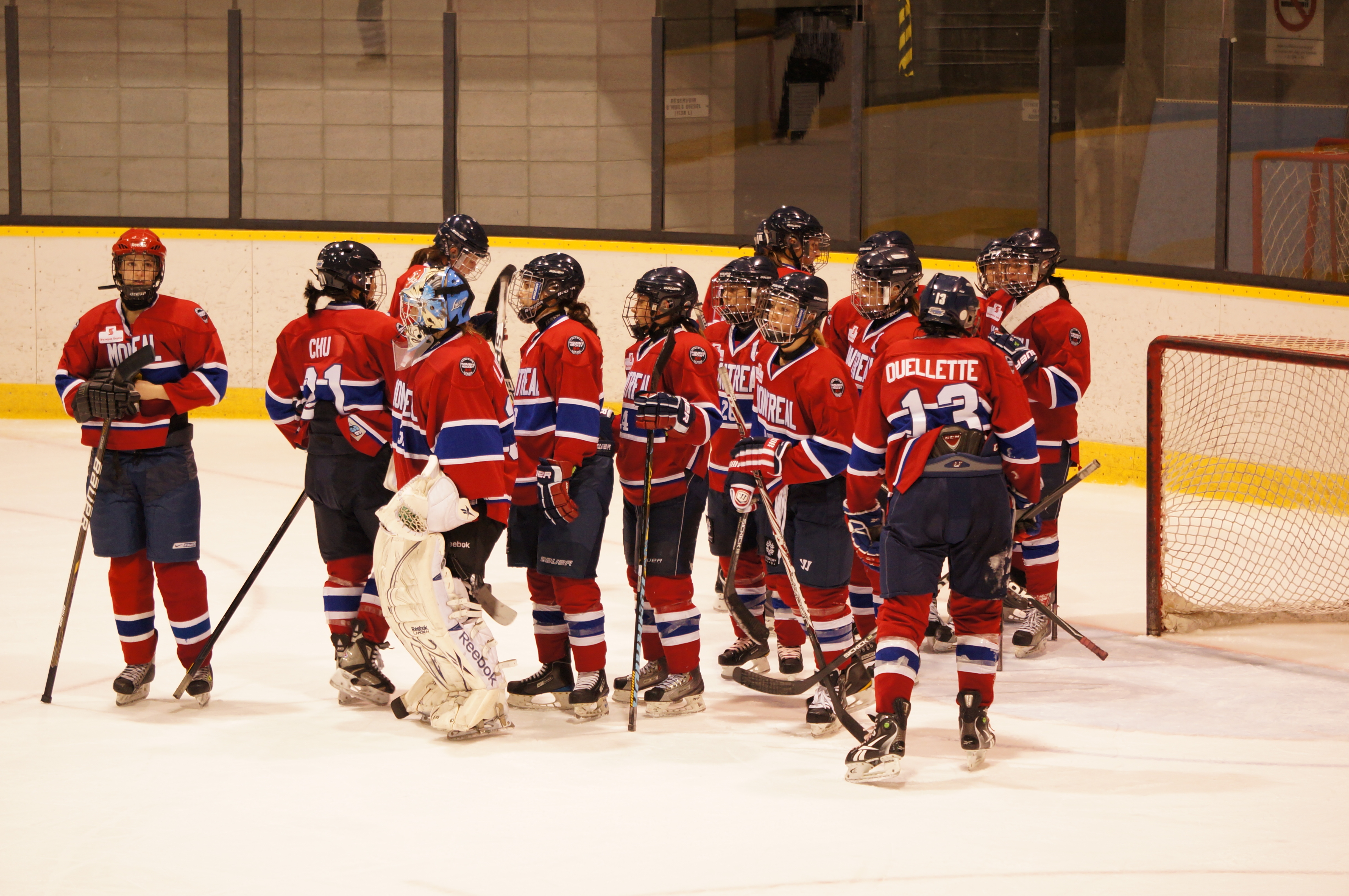 hockey féminin